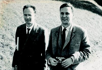 Zappa Guido (sinistra) e Szép, Jenö (destra)